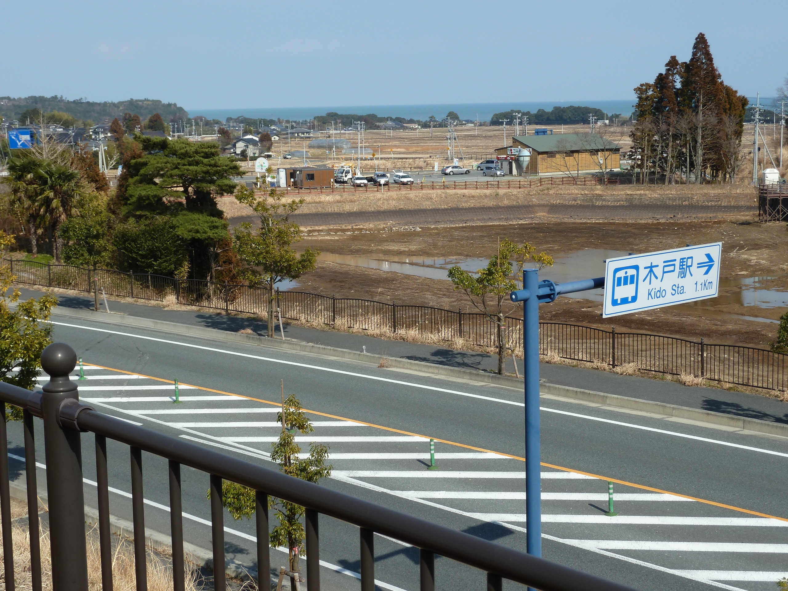 道の駅ならはから見た国道6号（福島県楢葉町）